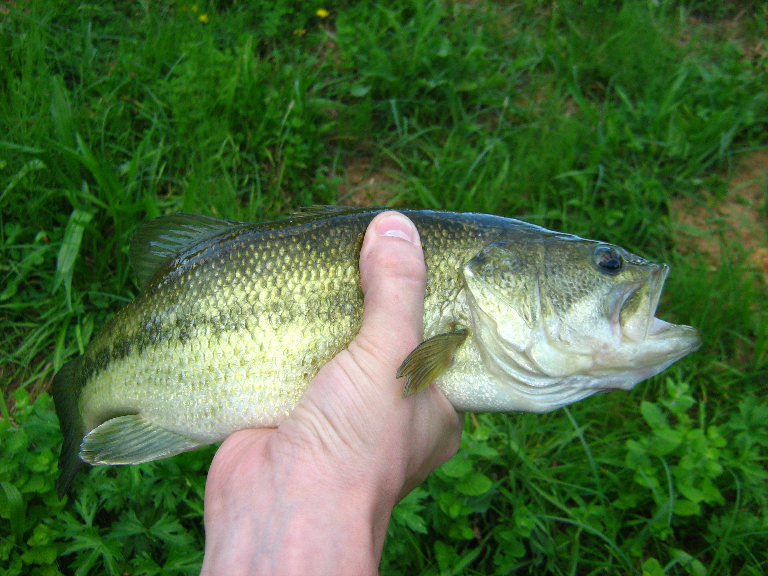 Black-bass à grande bouche, d'environ 2 livres, pêché en Dordogne.